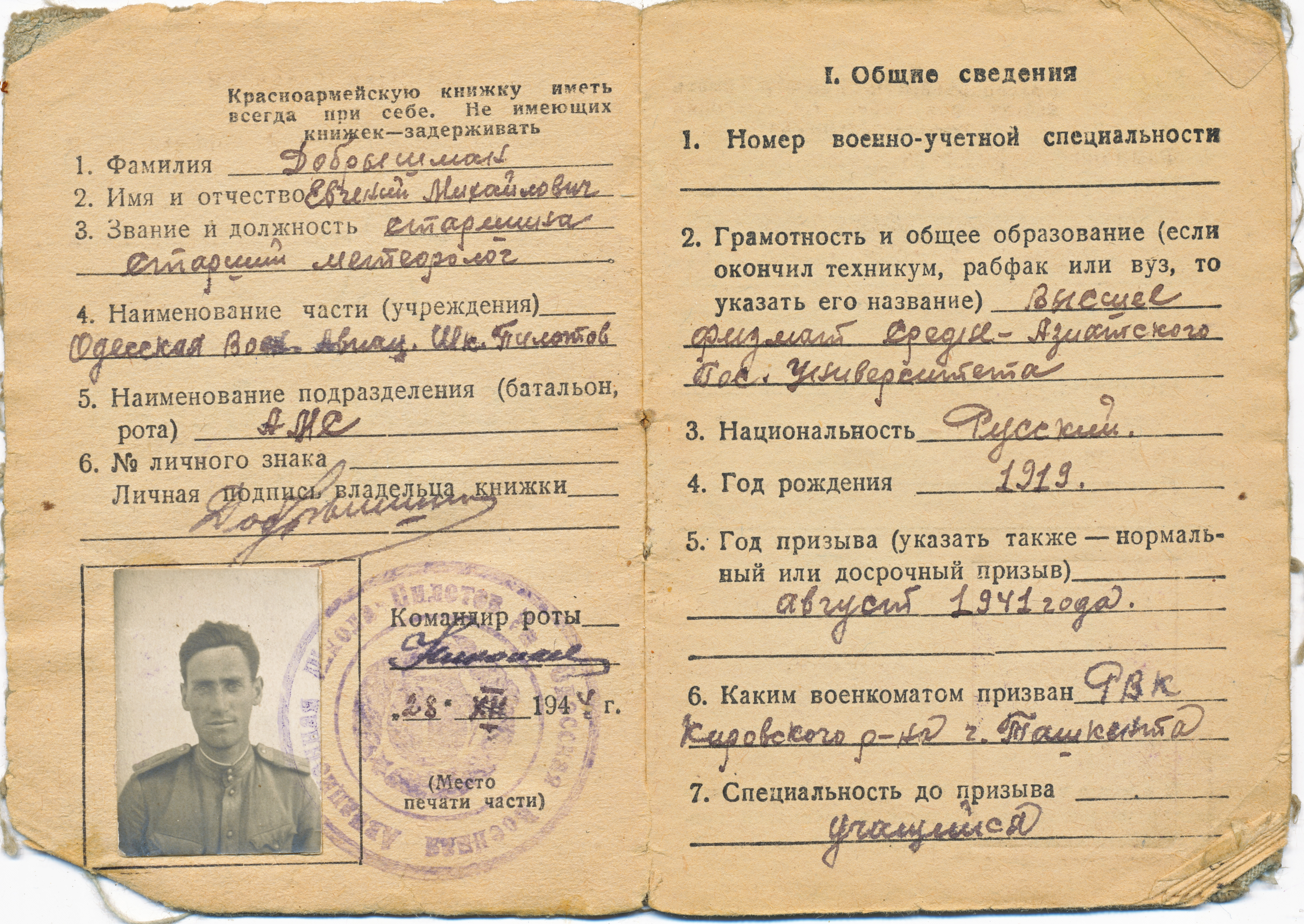 Красноармейская книжка образца 1944 года старшины Е. М. Добрышмана (1919-2016), старшего метеоролога Одесской военной авиационной школы пилотов, в декабре 1941 года переброшенной в Киргизию.